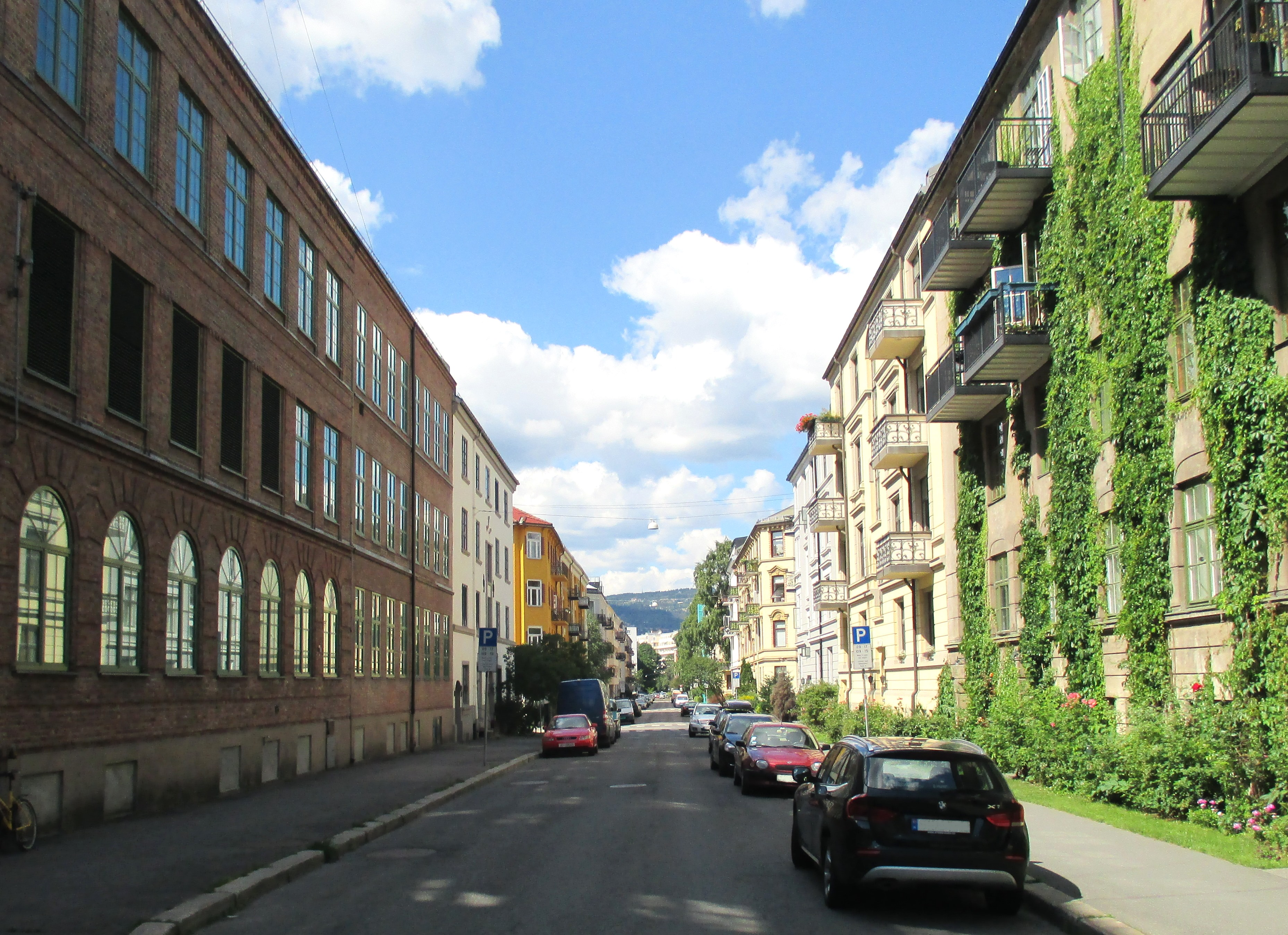 Åsaveien på Majorstuen i Oslo